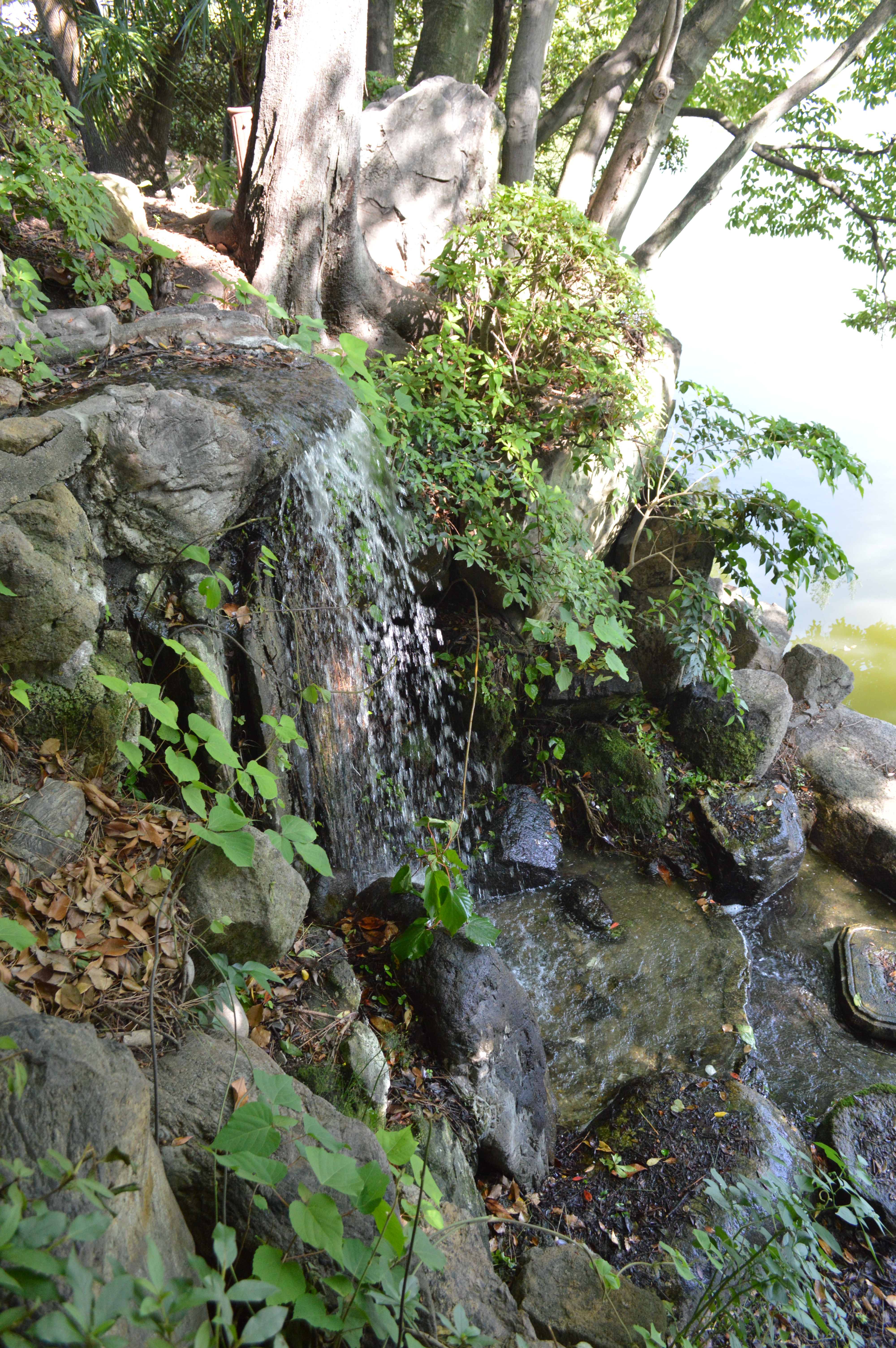 鶴舞公園にある酒匂の滝。